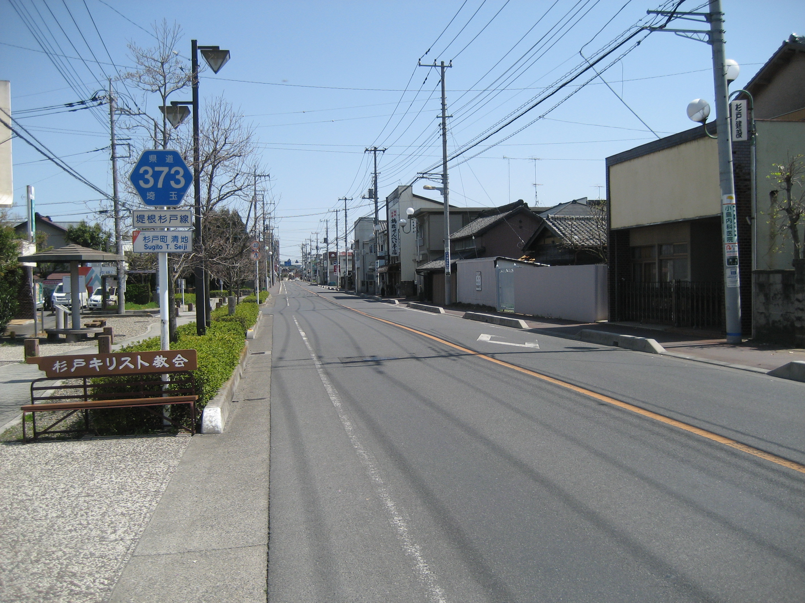 埼玉県道373号線杉戸町内